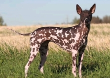 Taques